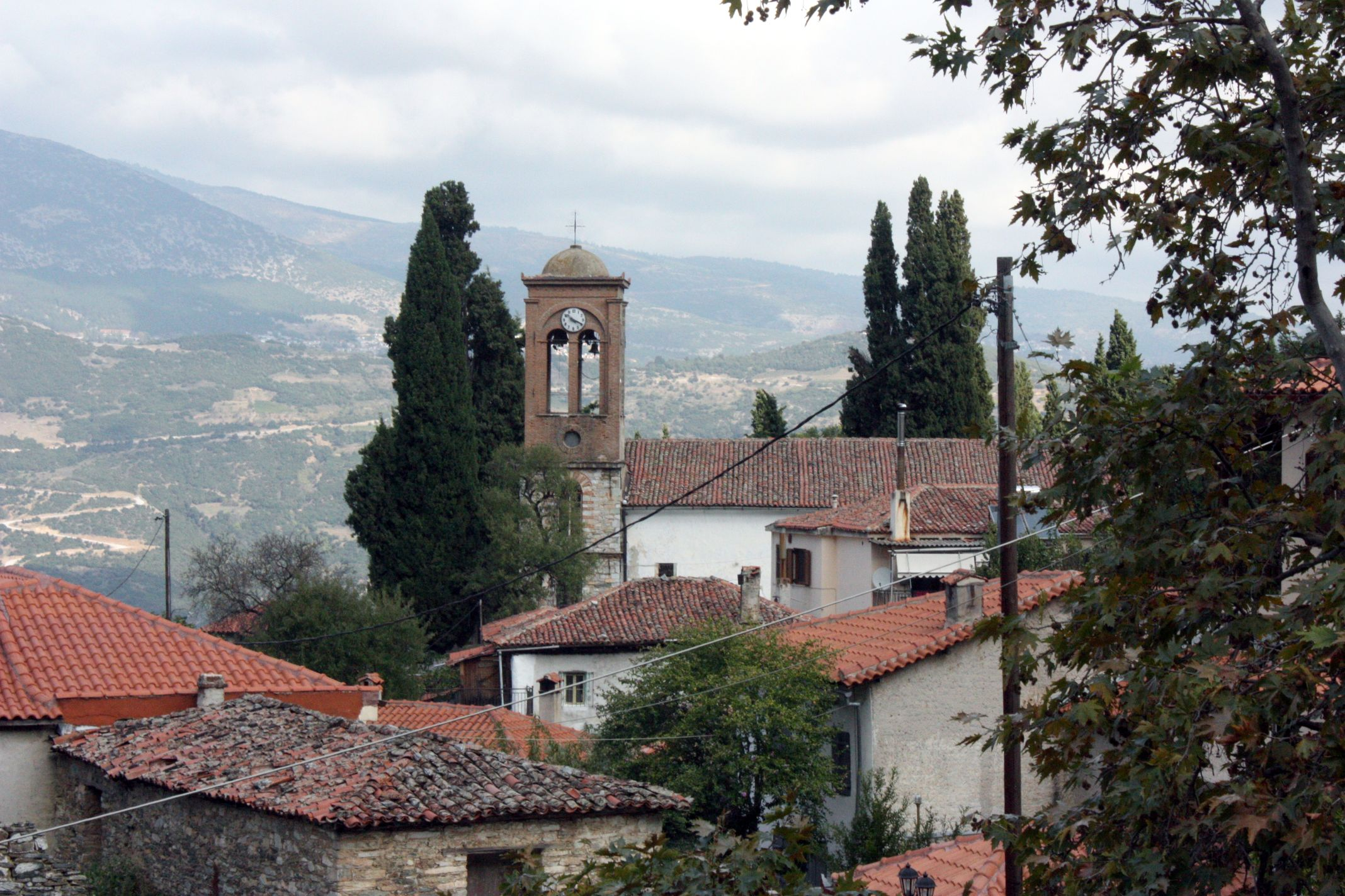 Die Kirche von Ampelakia